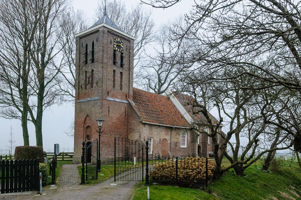 Het kerkje van Wadway, Noord Holland, Nederland